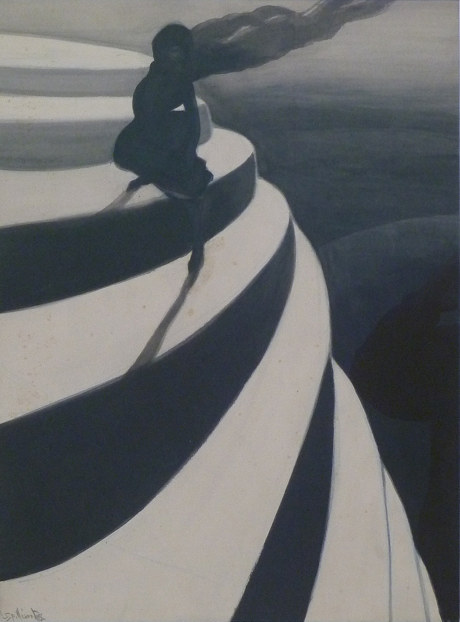 "De duizeling" (1908), gewassen Oost-Indische inkt, aquarel en kleurkrijt op papier door de Belgische kunstenaar Léon Spilliaert; Mu.ZEE, Oostende